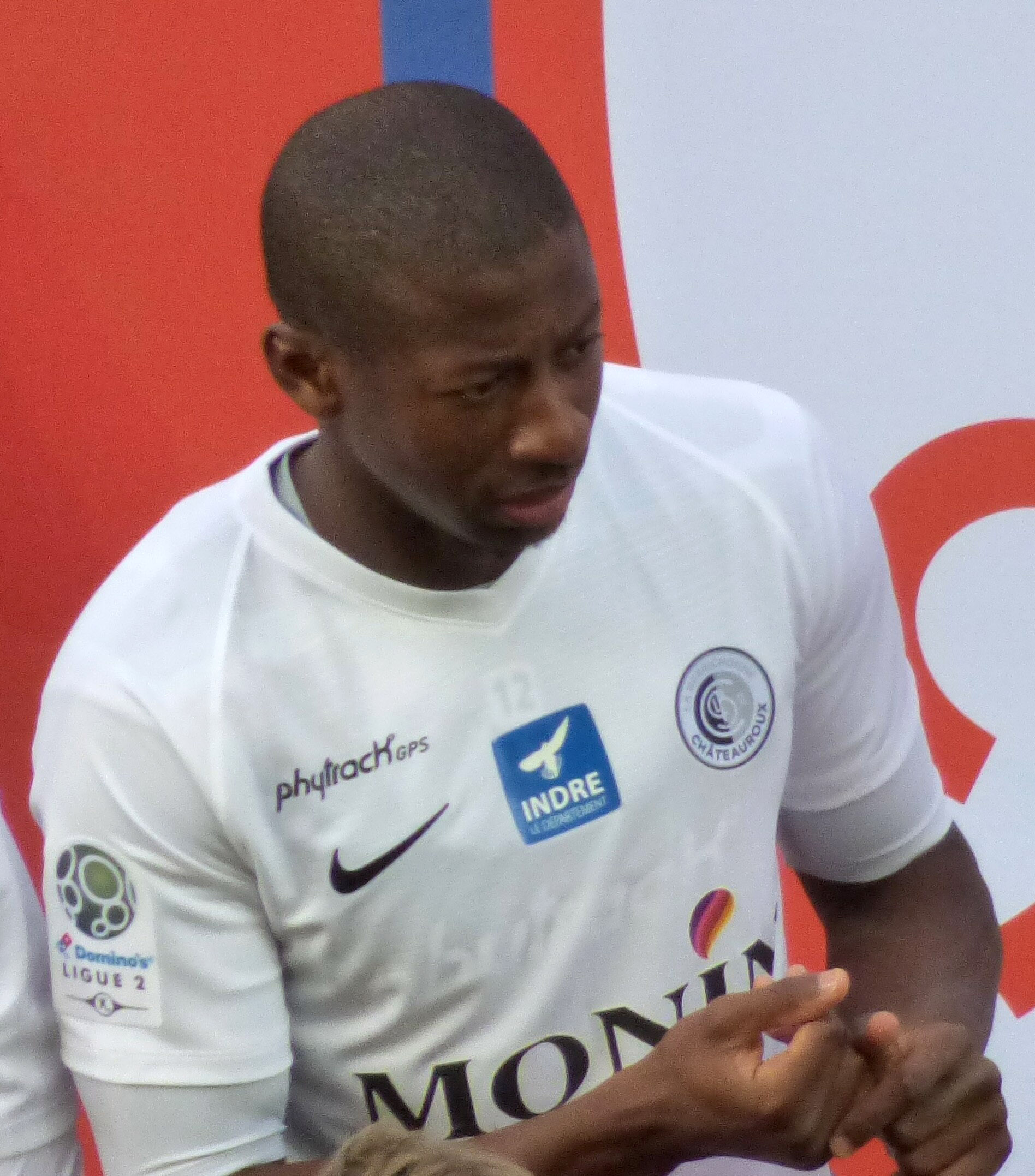 Nama Fofana avant le match RC Lens / LB Châteauroux, le 3 novembre 2018, comportant pour la treizième journée du championnat de France de football de Ligue 2, au Stade Bollaert-Delelis.